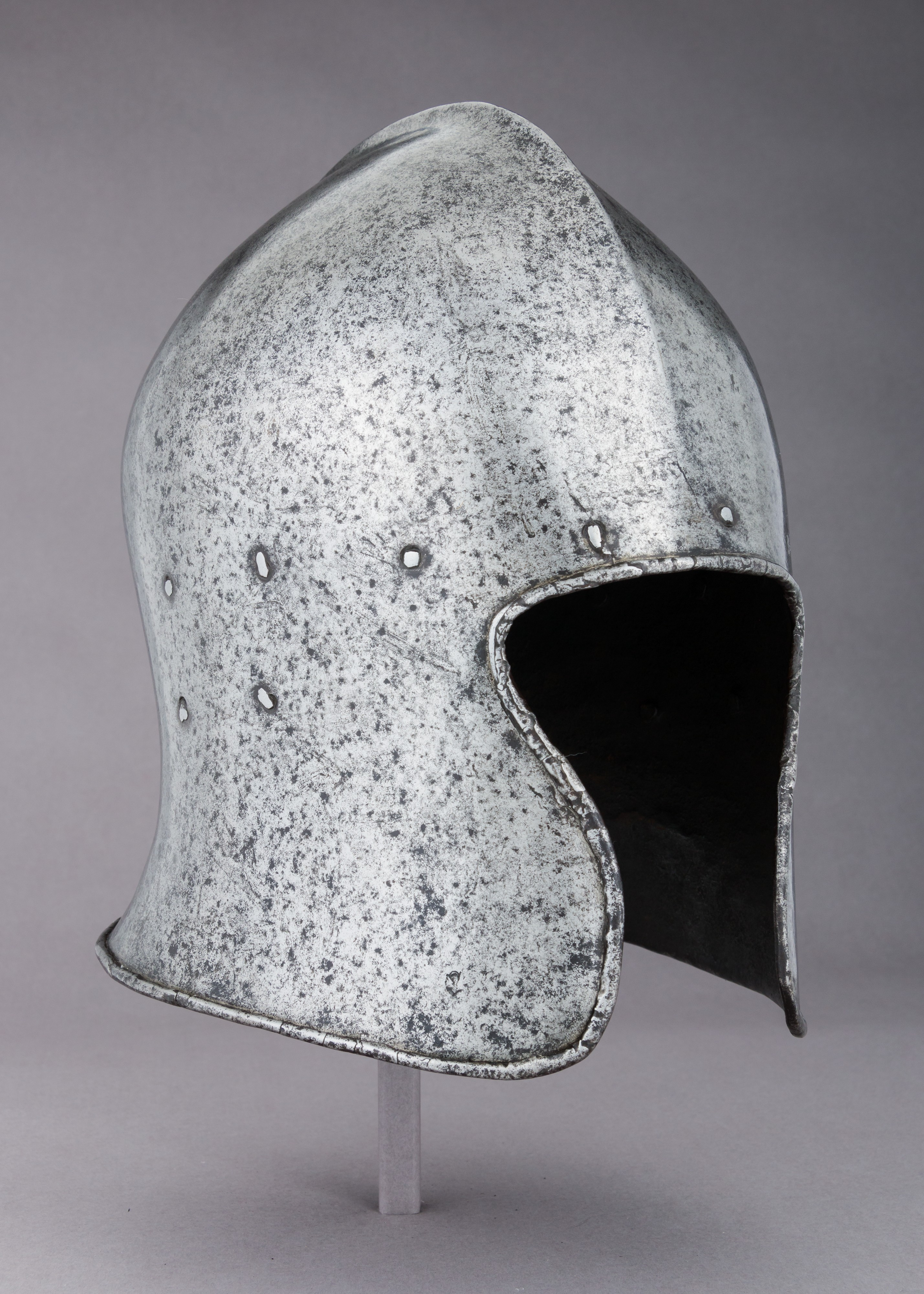 Italian, Milan; Sallet; Helmets